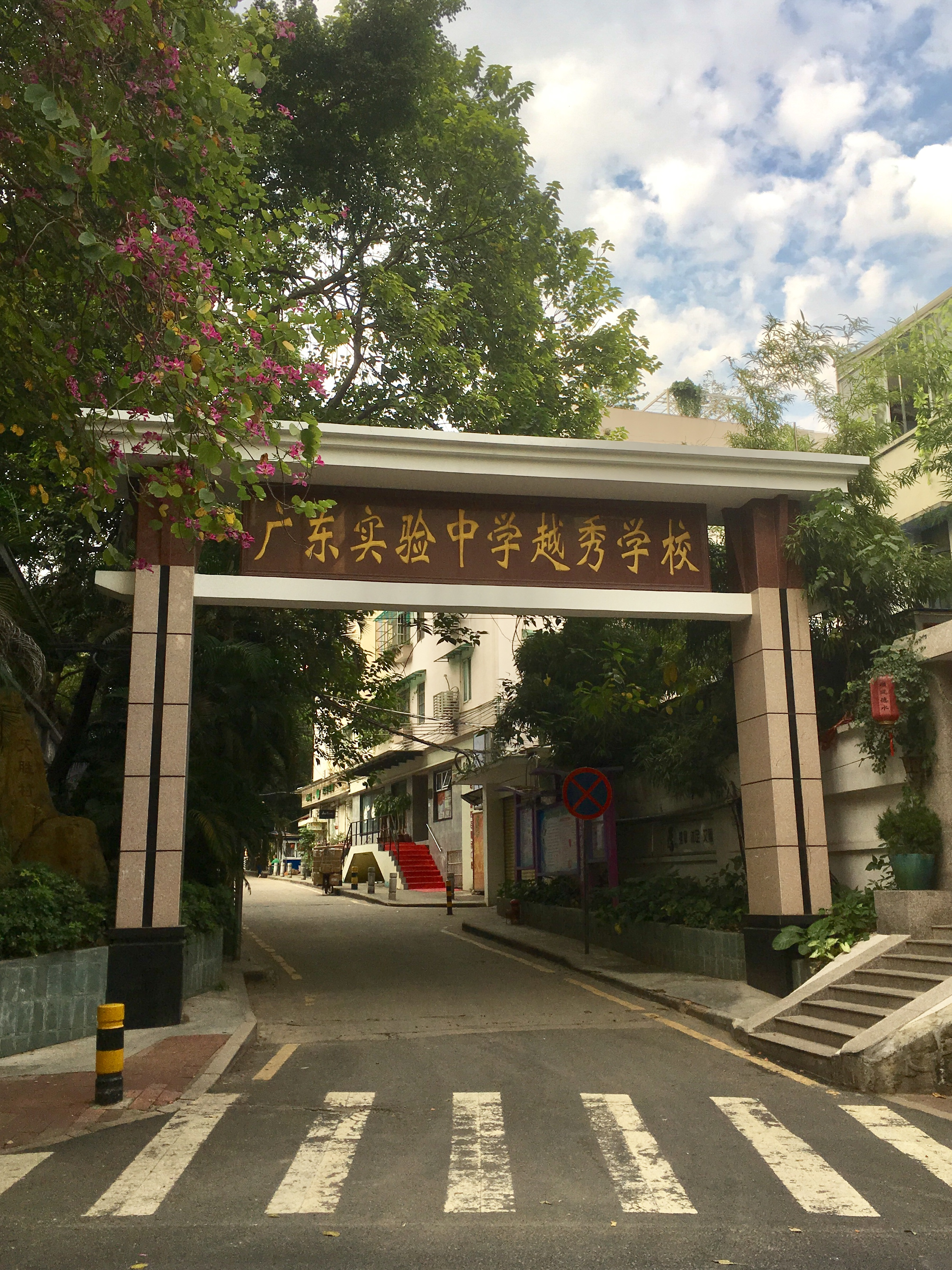 中文（香港）: 廣東實驗中學越秀學校天勝校區於天勝村口的牌坊